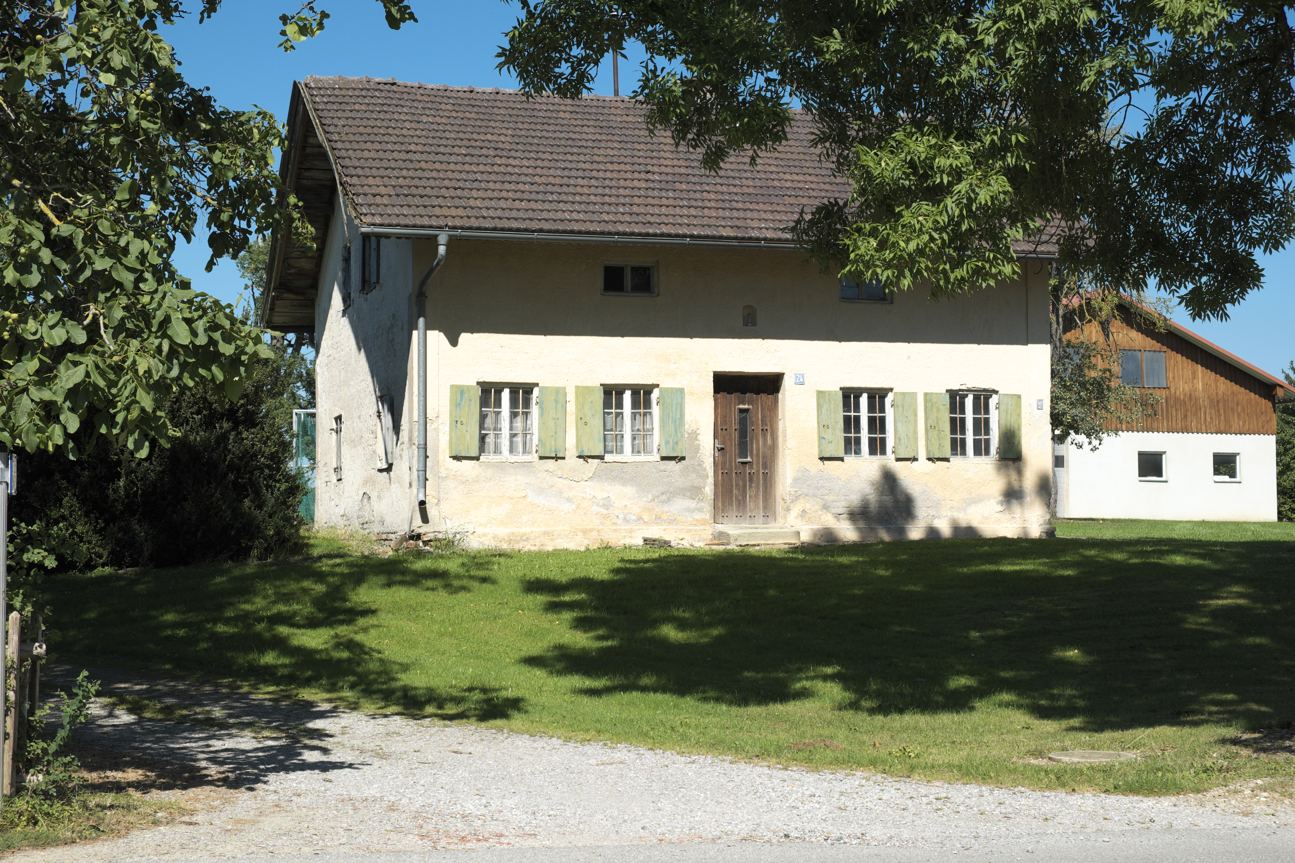 Ehemaliges Austragshaus in Holzhausen (Alling) im Landkreis Fürstenfeldbruck (Bayern/Deutschland)